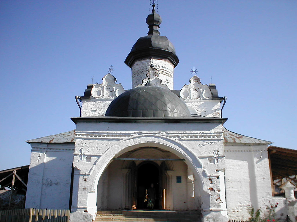 Успенский собор в Богородице-Успенском монастыре на острове-граде Свияжск Dormition temple of Dormition monastery in city-island Sviyazhsk